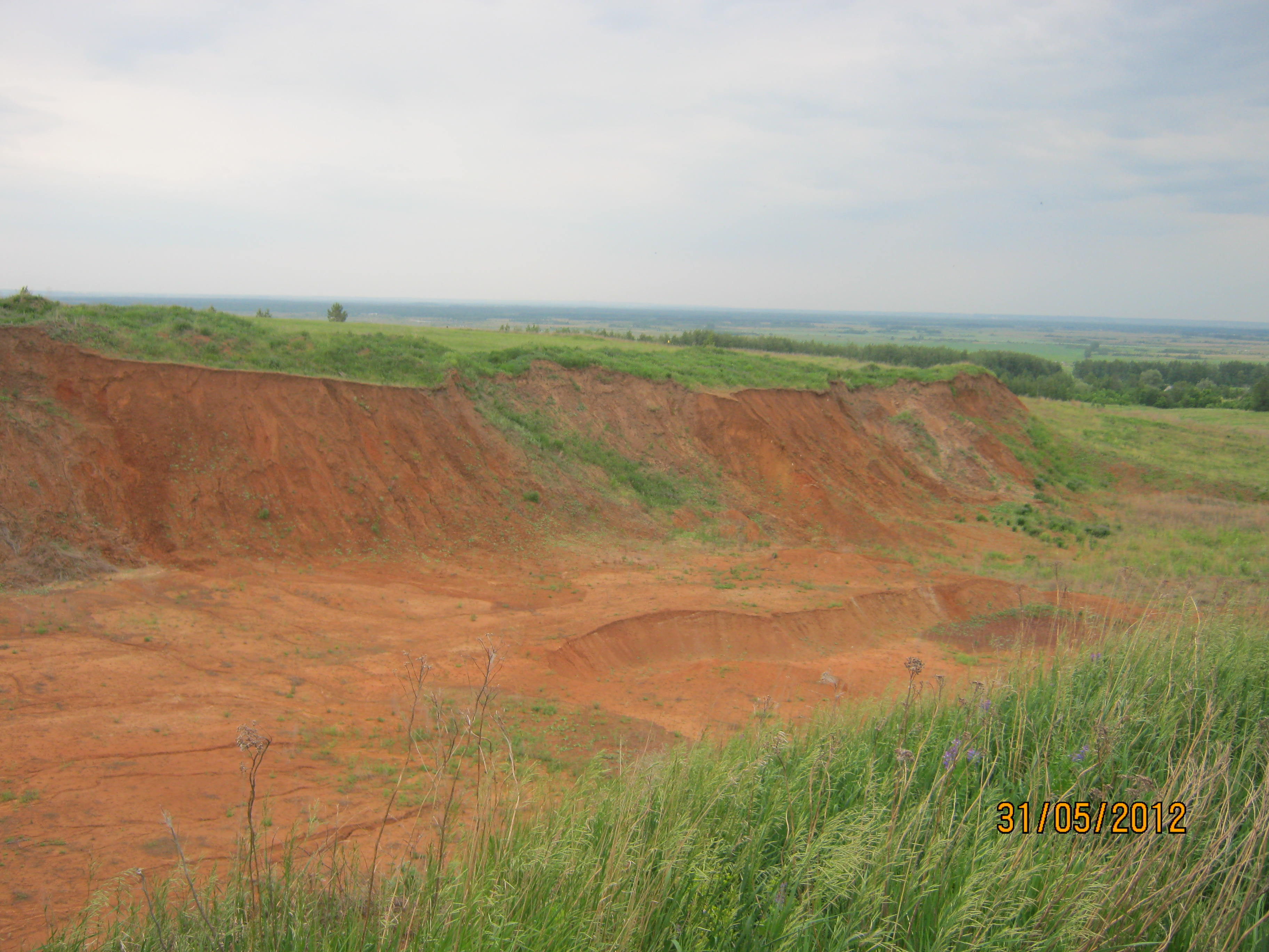 Карьер краной глины для Нефтекамского завода керамического кирпича (вблизи д. Новонагаево)